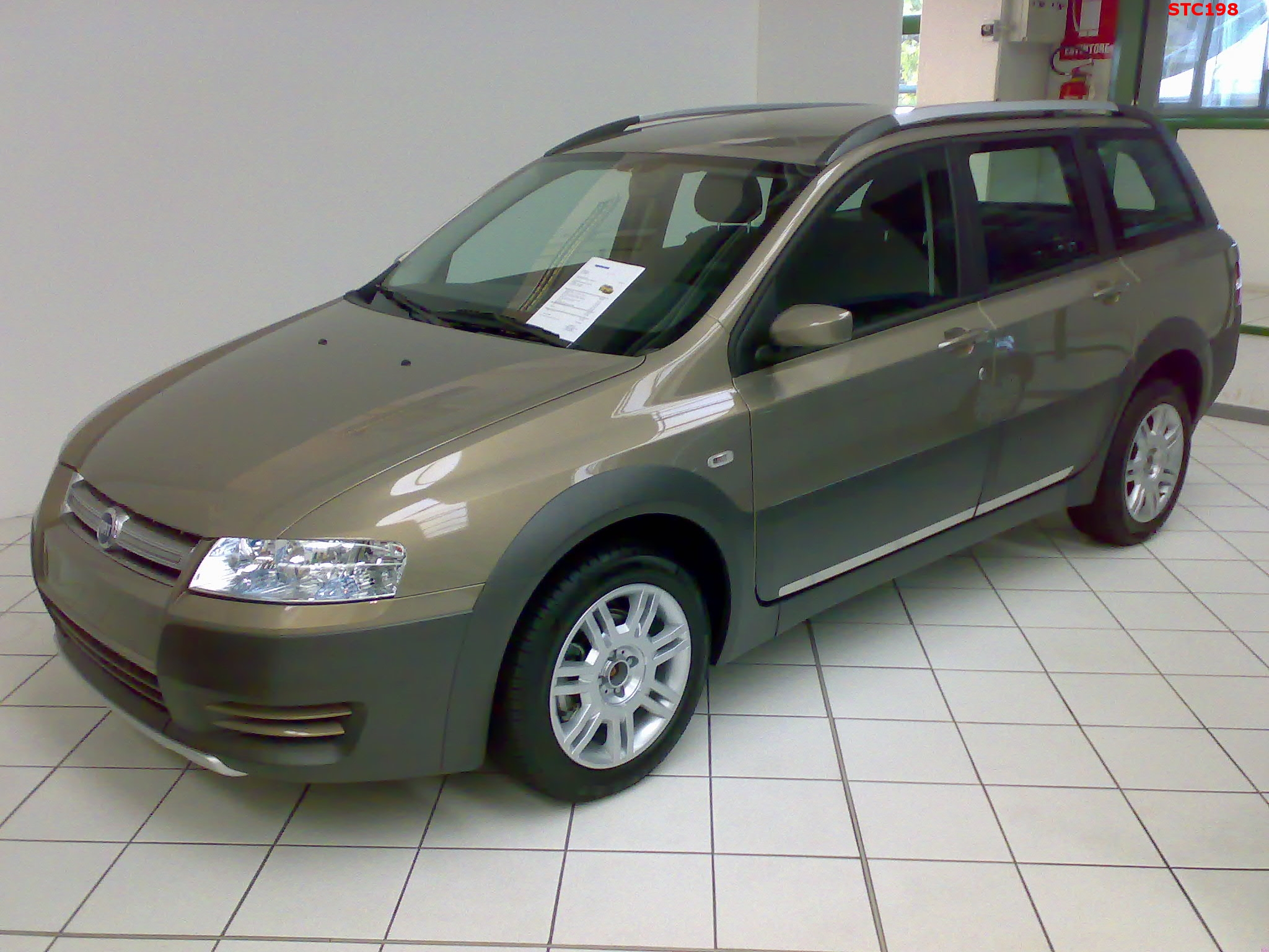 Fiat Stilo Multiwagon - vista anteriore